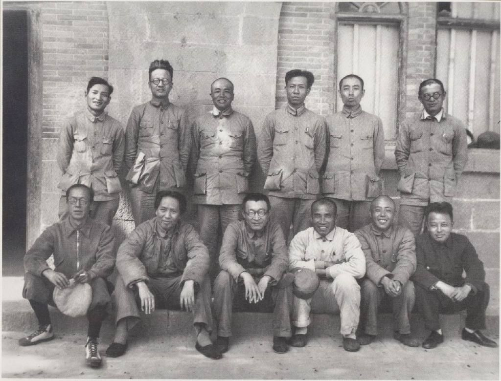 1938年9月29到11月6日，中共中央在延安召开扩大的六届六中全会，总结全国抗战以来的经验教训，确定了党在抗战新阶段的基本方针和任务，会议决定撤销中共中央长江局，在重庆设立中共中央南方局，以全面领导国统区党组织，巩固和发展统一战线，。图为六届六中全会主席团成员合影。（前排左起：康生、毛泽东、王稼祥、朱德、项英、王明，后排左起：陈云、博古、彭德怀、刘少奇、周恩来、张闻天）。